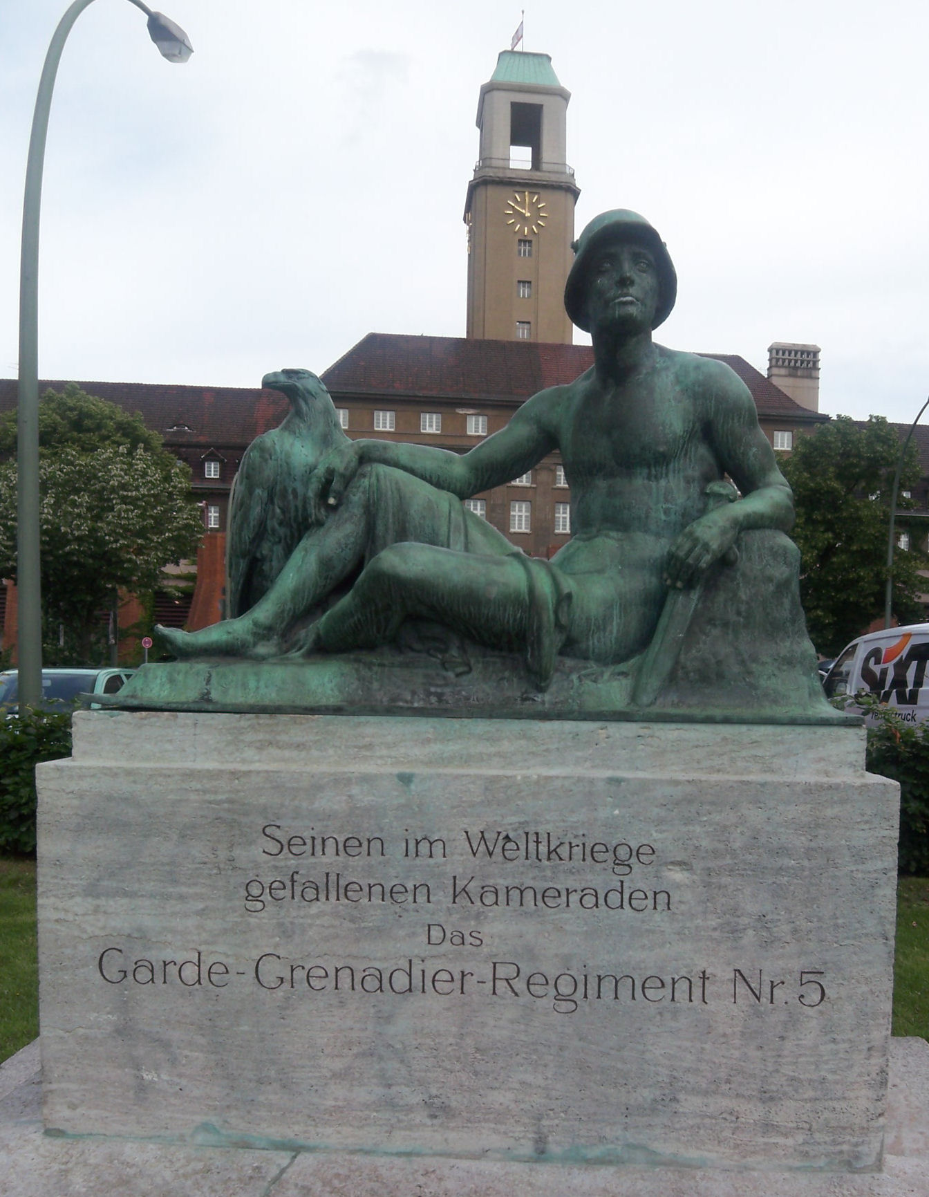 Denkmal des Garde-Grenadier-Regiments Nr.5 in Berlin-Spandau, hinter dem Rathaus